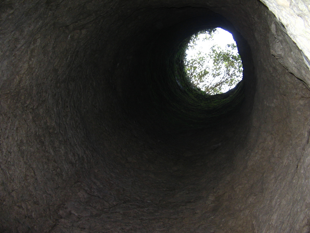 Повъртеника - кладенец, използван от защитниците на Латинското градище и възникналия по-късно християнски манастир. Село Горталово, България